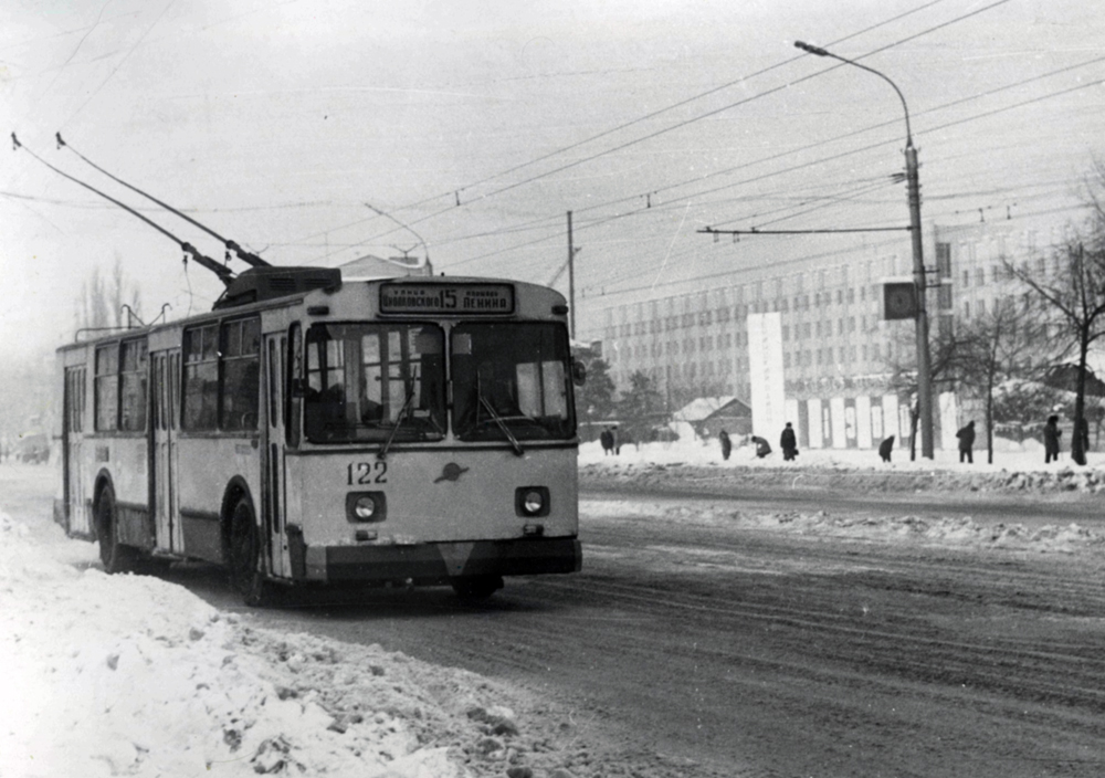 Воронежский троллейбус на новой линии по ул. 20-Летия Октября